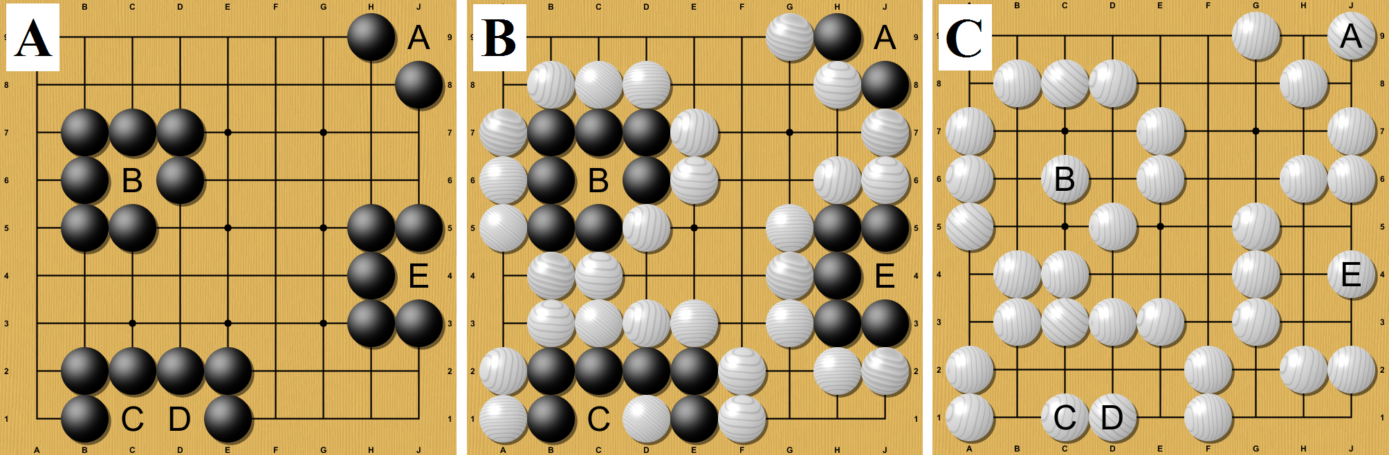 Ténica de captura en el Go